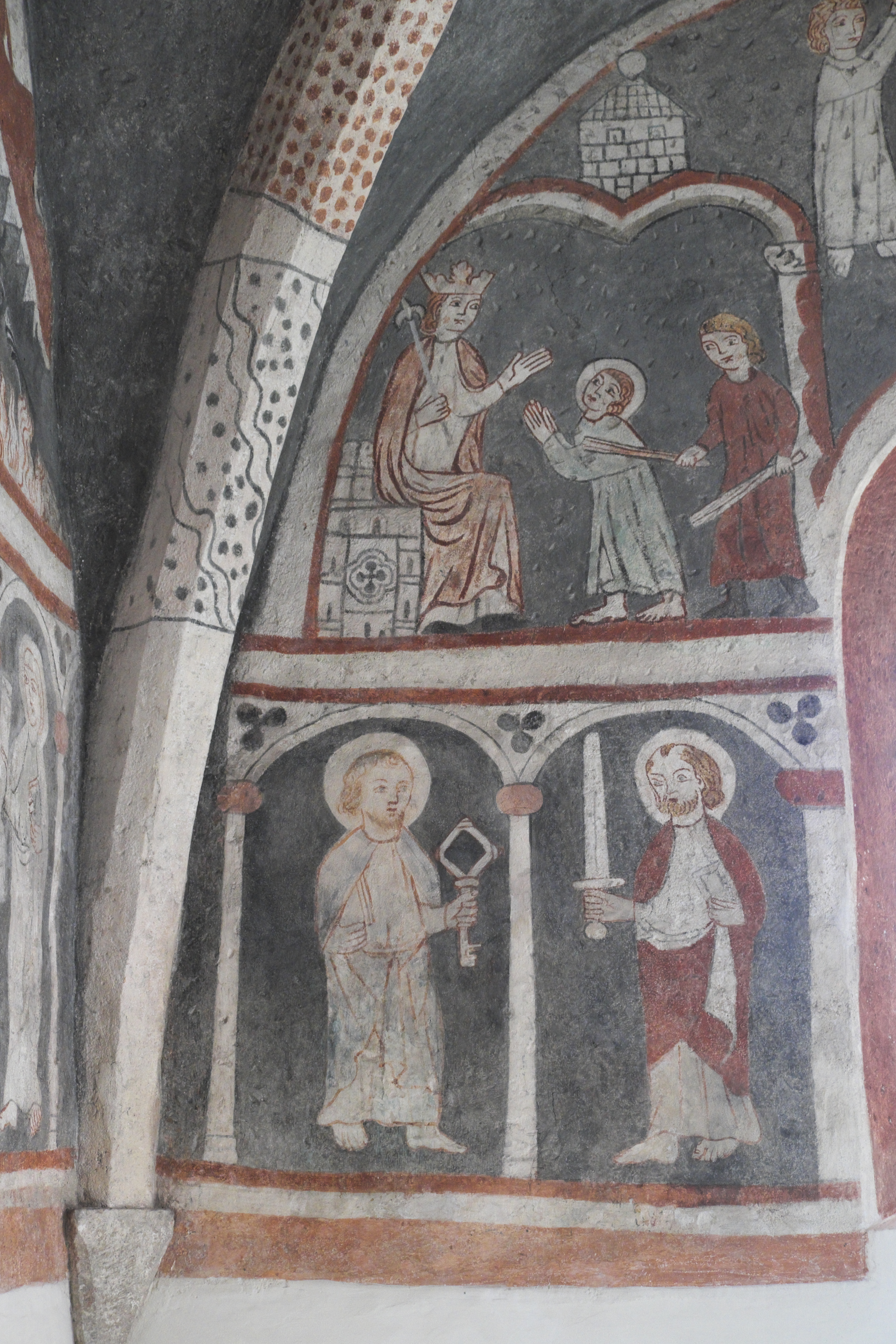 Katholische Pfarrkirche St. Vitus in Kottingwörth (Beilngries) im oberbayerischen Landkreis Eichstätt (Bayern/Deutschland), Wand- und Deckenmalereien in der Vituskapelle, in Fresko- und Seccotechnik, wohl nach 1313 entstanden